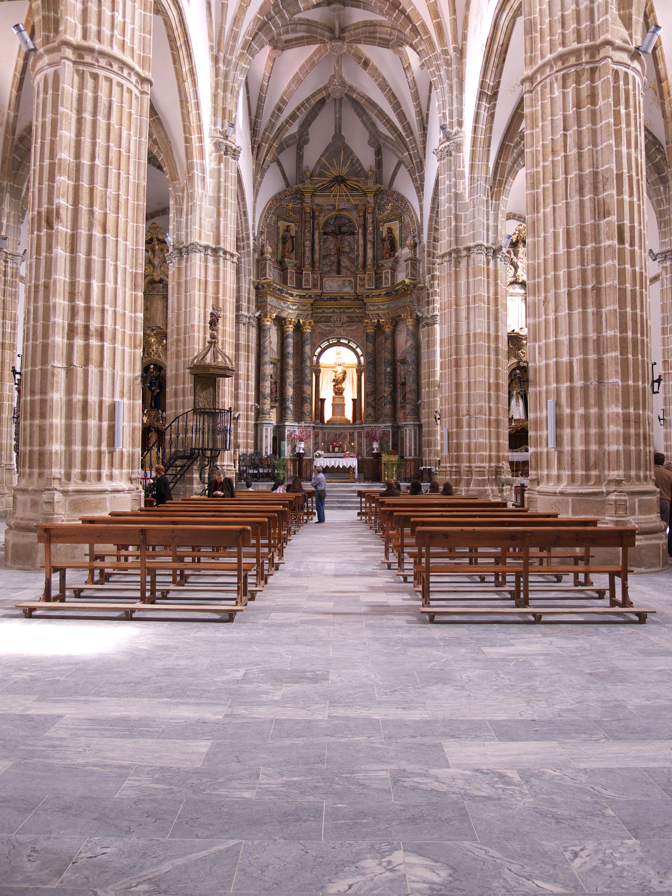 A finales del siglo XV, el Arzobispado de Sevilla decide sustituir la obra de los siglos XIII y XIV. Trazada por el maestro del gótico Alonso Rodríguez, o su anterior Juan de Hoces, alcanzará su última fase constructiva a principios del XVII, a causa de problemas financieros y a la guerra con Portugal.